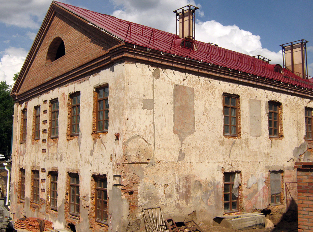 Мінск. Вуліца Герцэна, 10